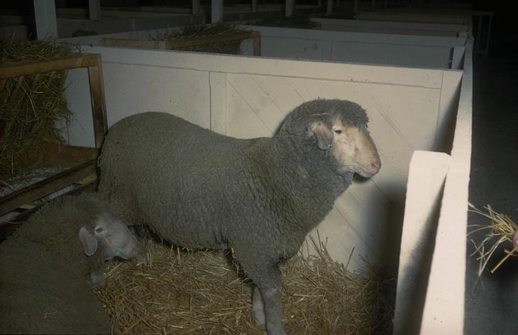 Mouton, de la race ovine de l'Est à laine mérinos